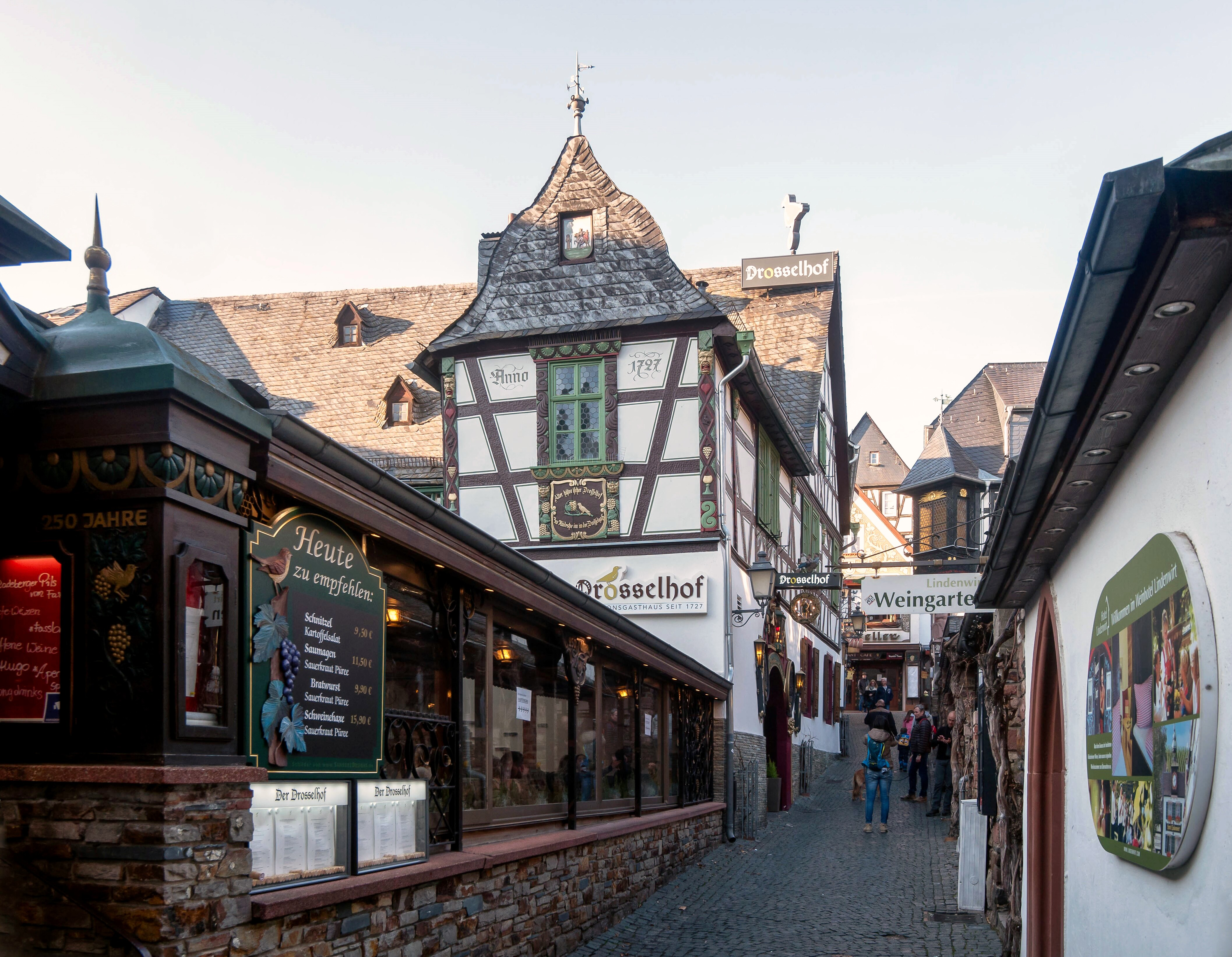 Die Rüdesheimer Drosselgasse mit dem 1727 als Weinhaus eröffnetem Drosselhof